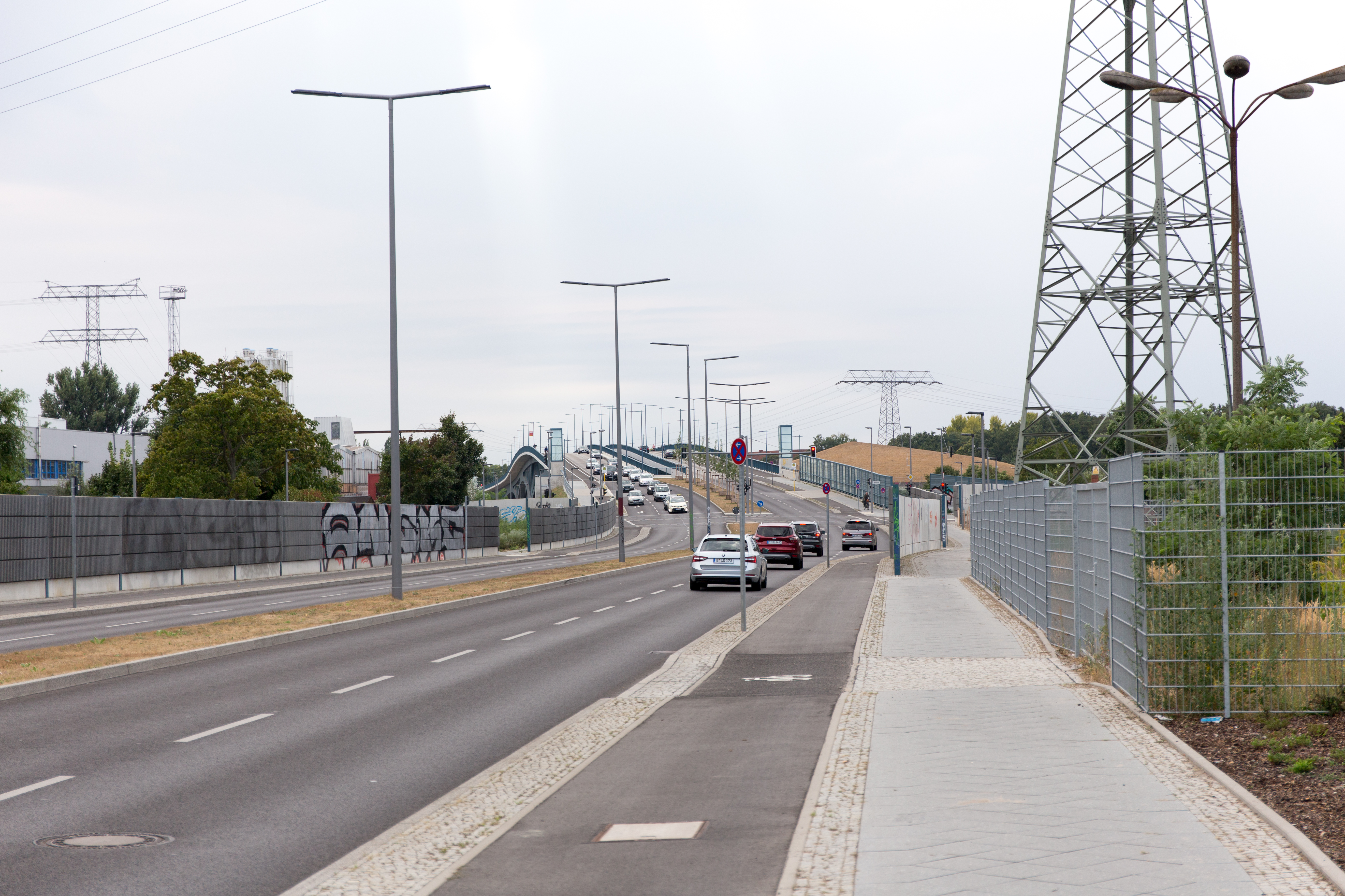 Minna Todenhagen Straße mit Brücke